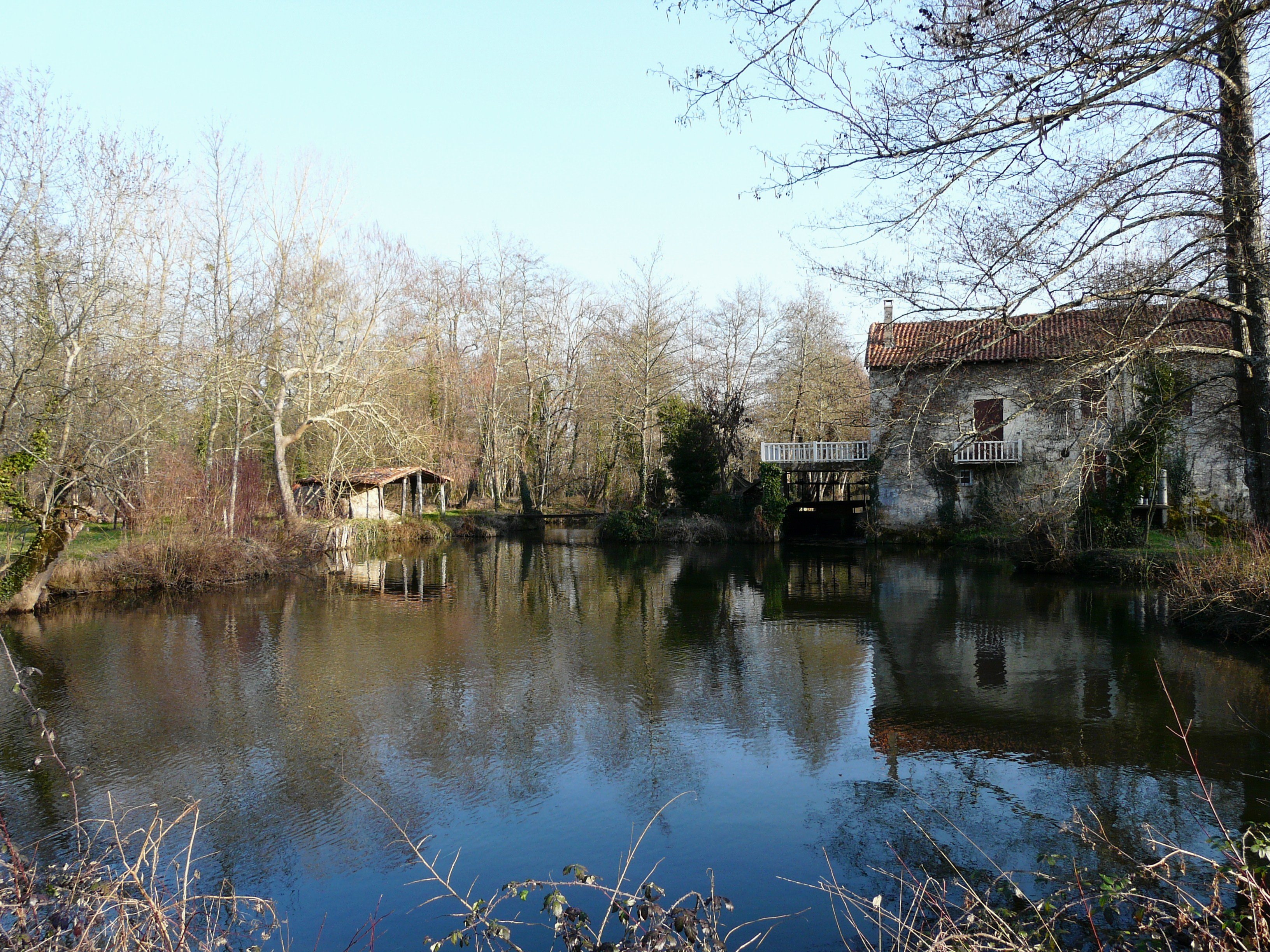 La Dronne en aval du moulin de Papalis, Ribérac, Dordogne, France. Vue prise en direction de l'amont.